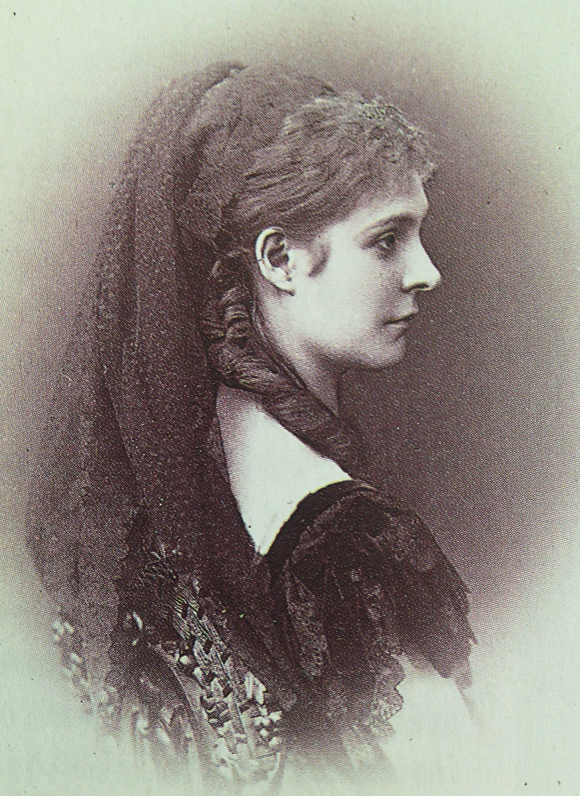 Варвара Петровна Орлова, ур. Шувалова (1850—1872), с 1868 года жена генерала Д. И. Орлова.